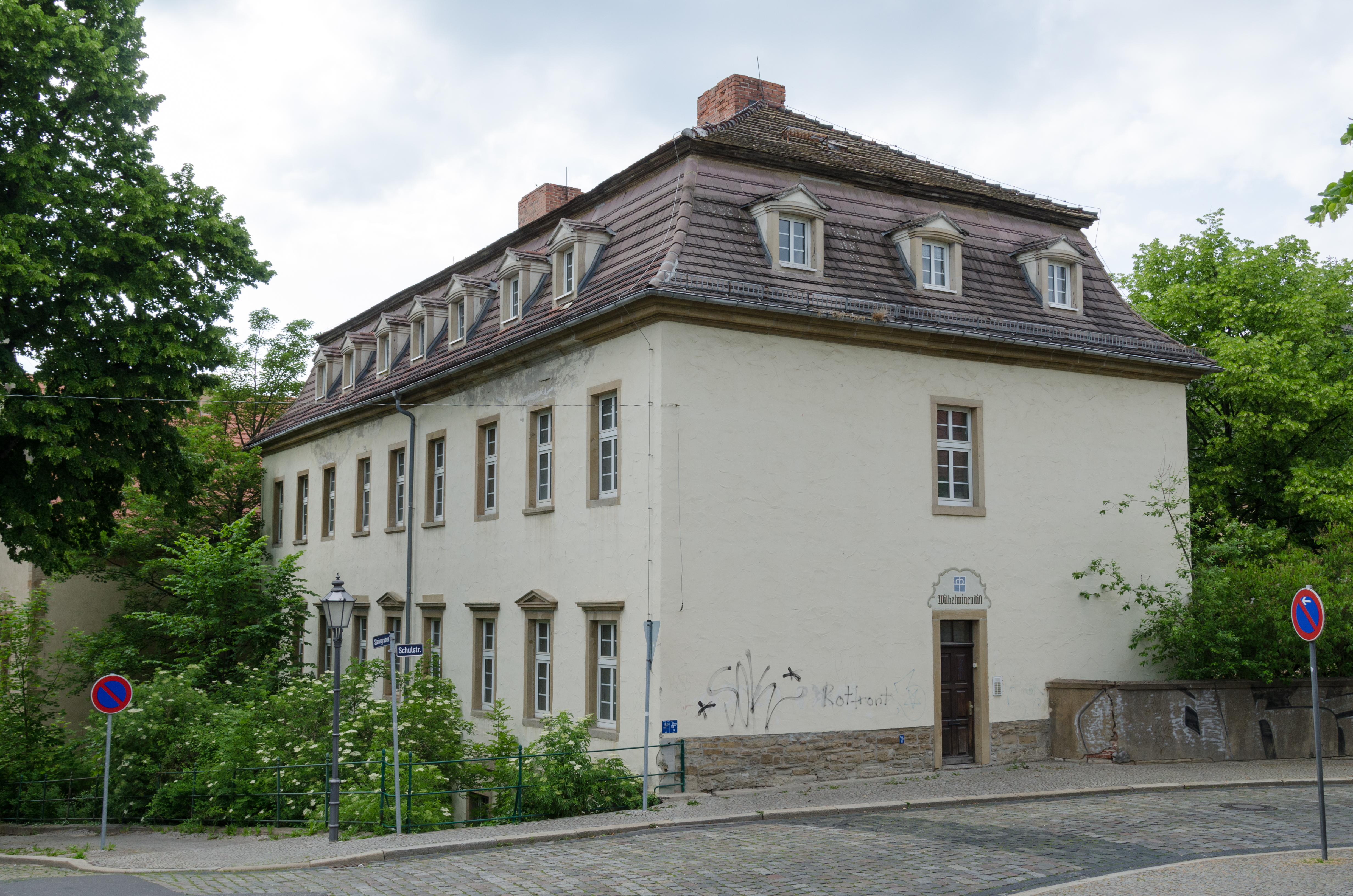 Zeitz, Schulstraße 5